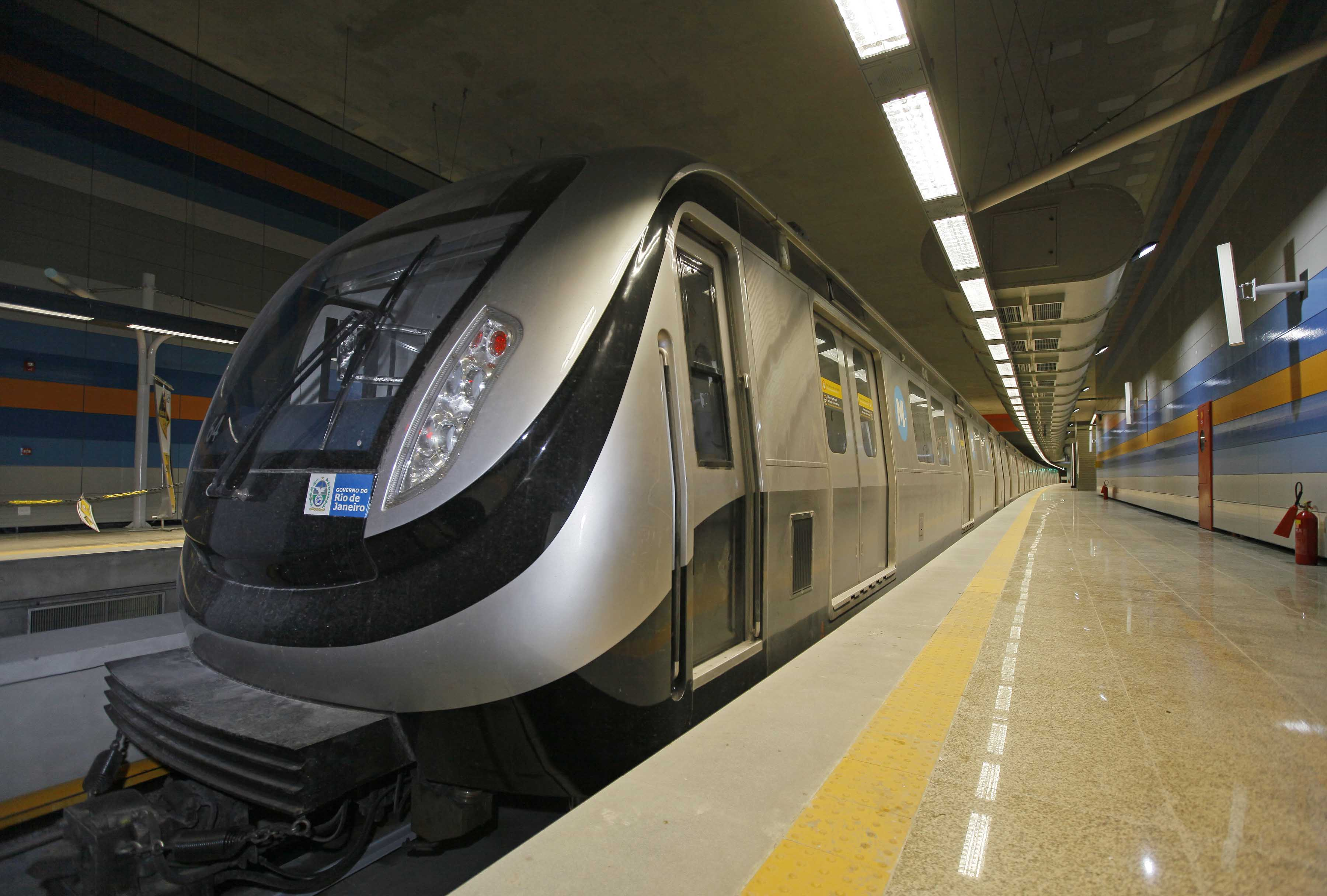 Estação Antero de Quental, no dia da inauguração no Leblon, Rio de Janeiro-RJ.